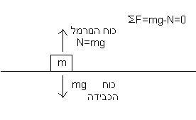 כשלא פועל שום כוח, הנורמל שווה של mg ושקול הכוחות הוא 0